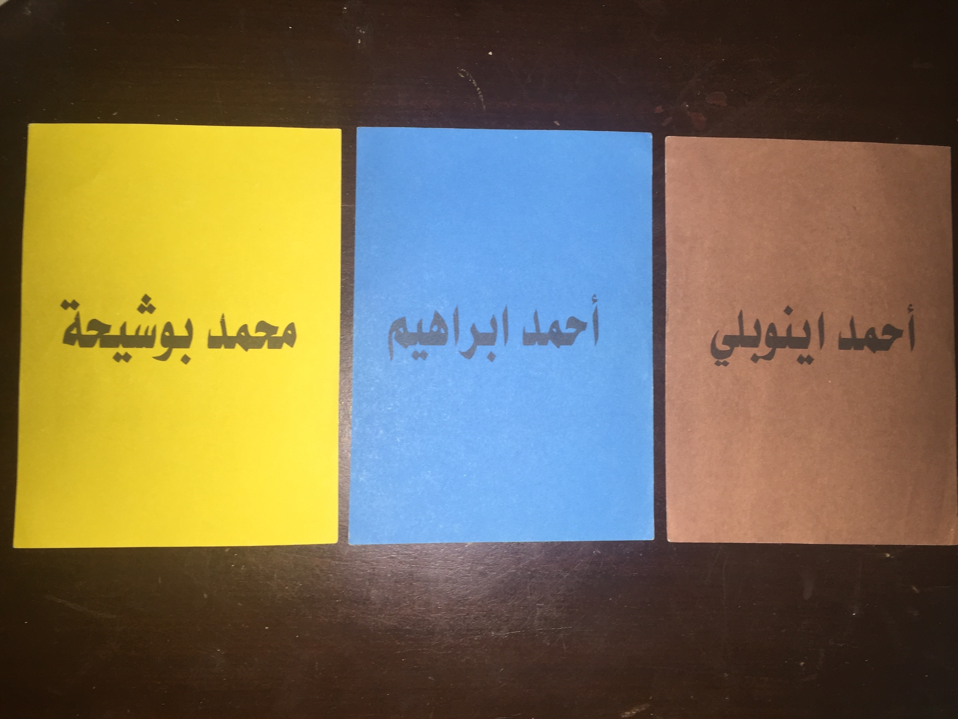 Bulletins des candidats aux présidentielles Tunisie 2009 hormis Ben Ali.